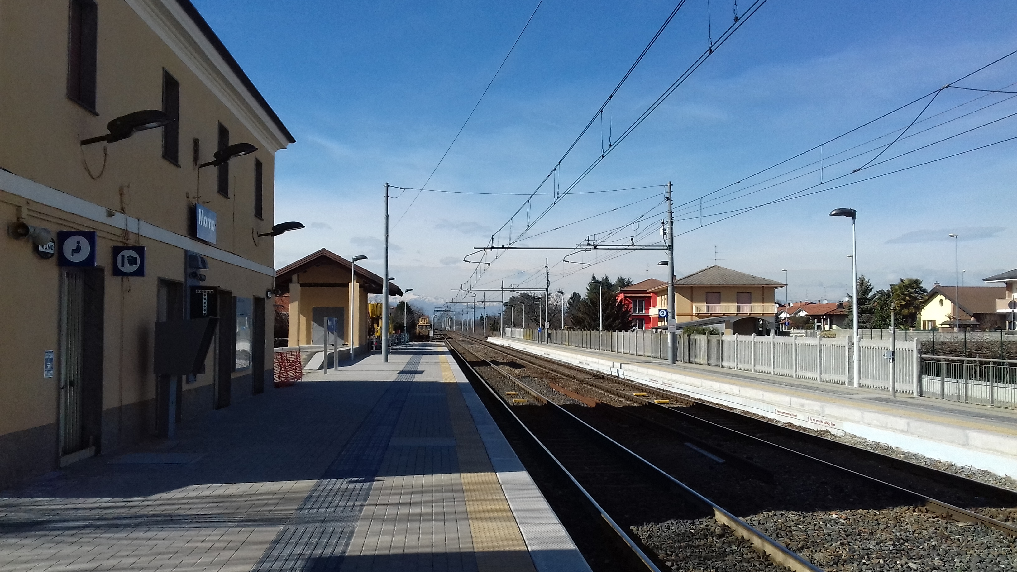 Stazione di Momo, lato binari, lato Domodossola